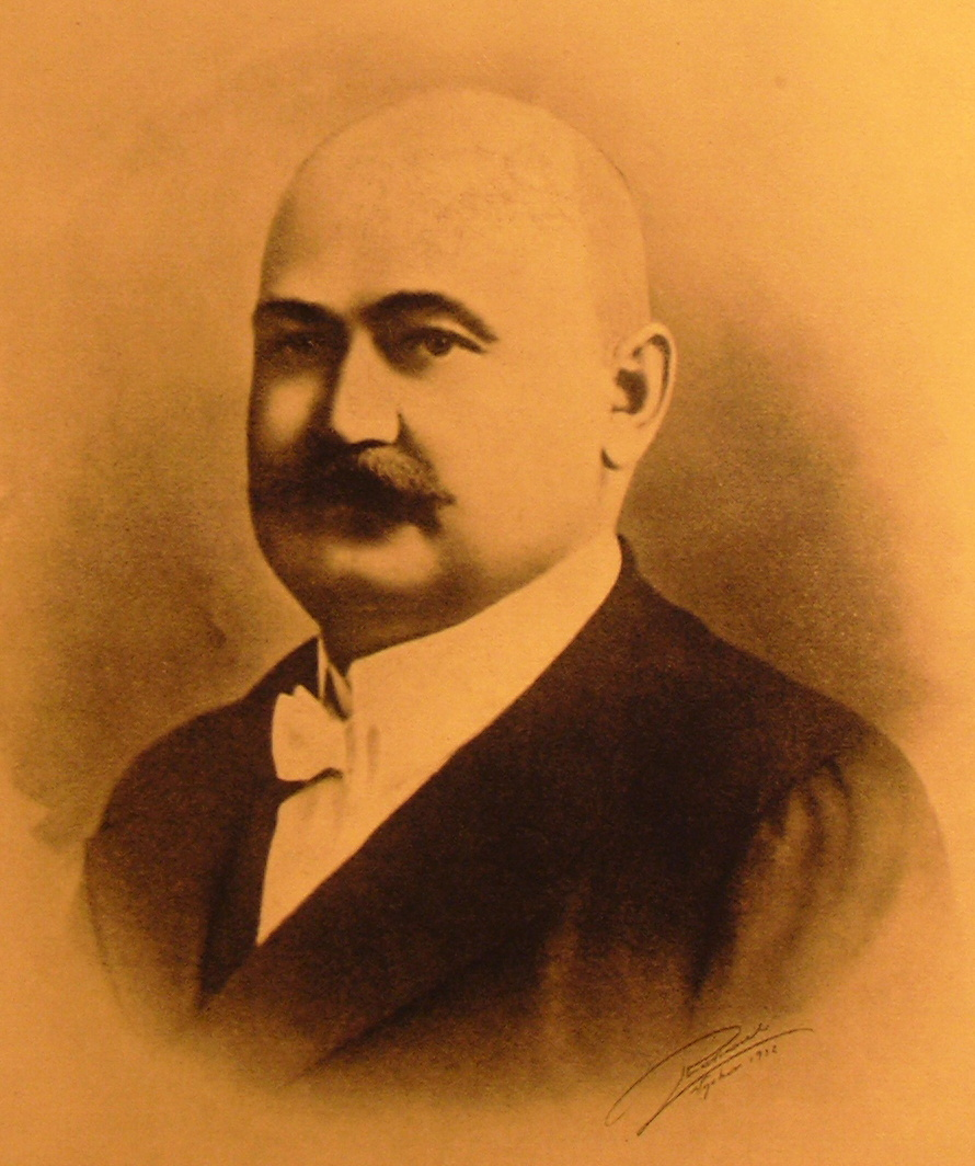 Karel Albrecht Starosta města Vyškov 1910 - 1911